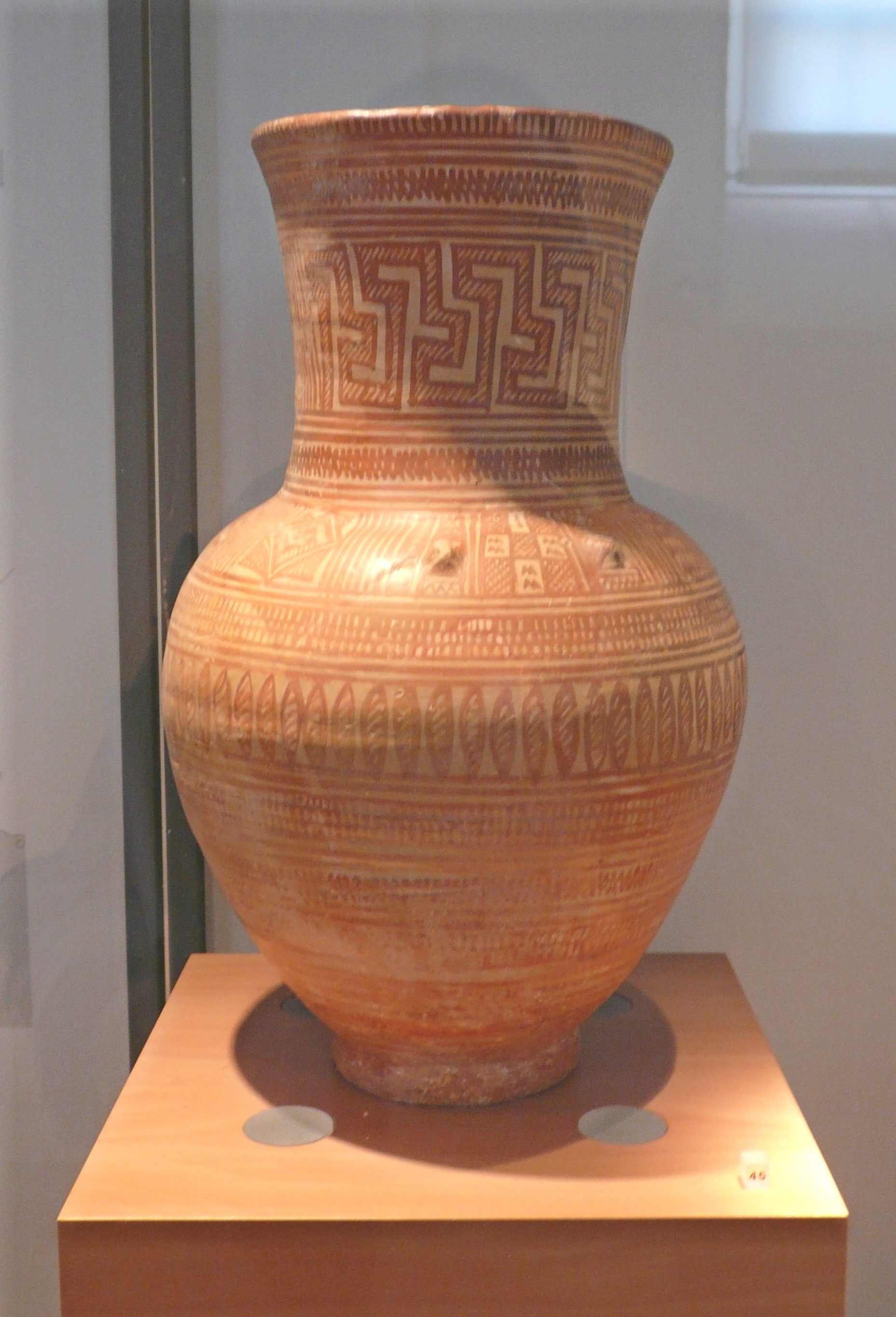 Vase pichet, dipylon, VIIIe siècle av J.C., antiquités classiques du musée d’archéologie méditerranéenne de la vieille charité à Marseille